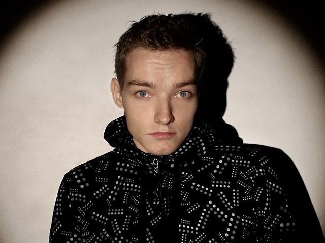 Panda (of Panda Drum & Bass), pseudoniem van Peter Altarbor (Nijmegen, 14 april 1986), is een Nederlandse electronische muziek artiest uit Amsterdam, Nederland, gespecialiseerd in Drum and Bass.